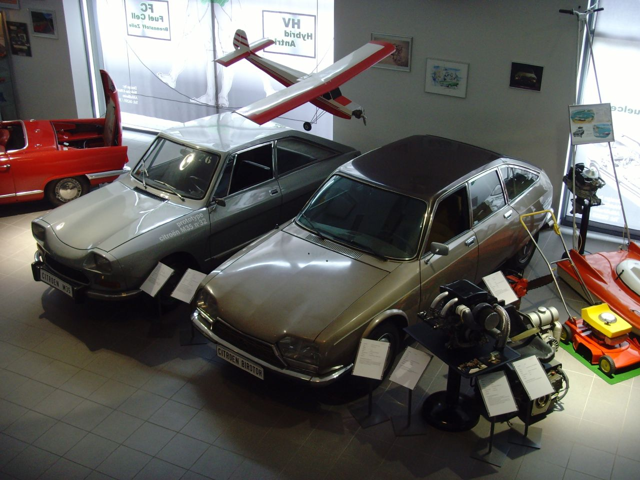 Museum AUTOVISION Tradition & Forum, Altlußheim